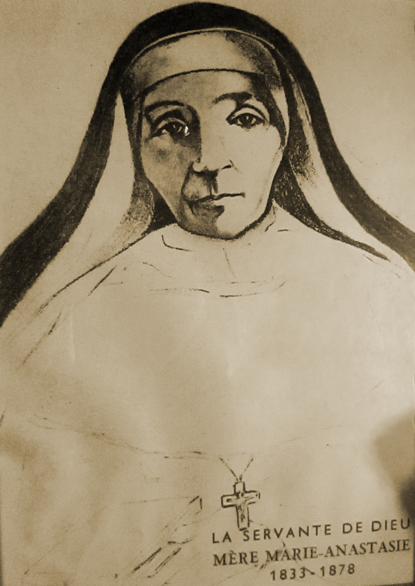 Quadro localizado no Convento de Bor - França, 2016